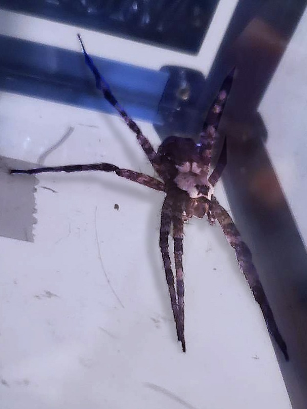 Dolomedes albineus